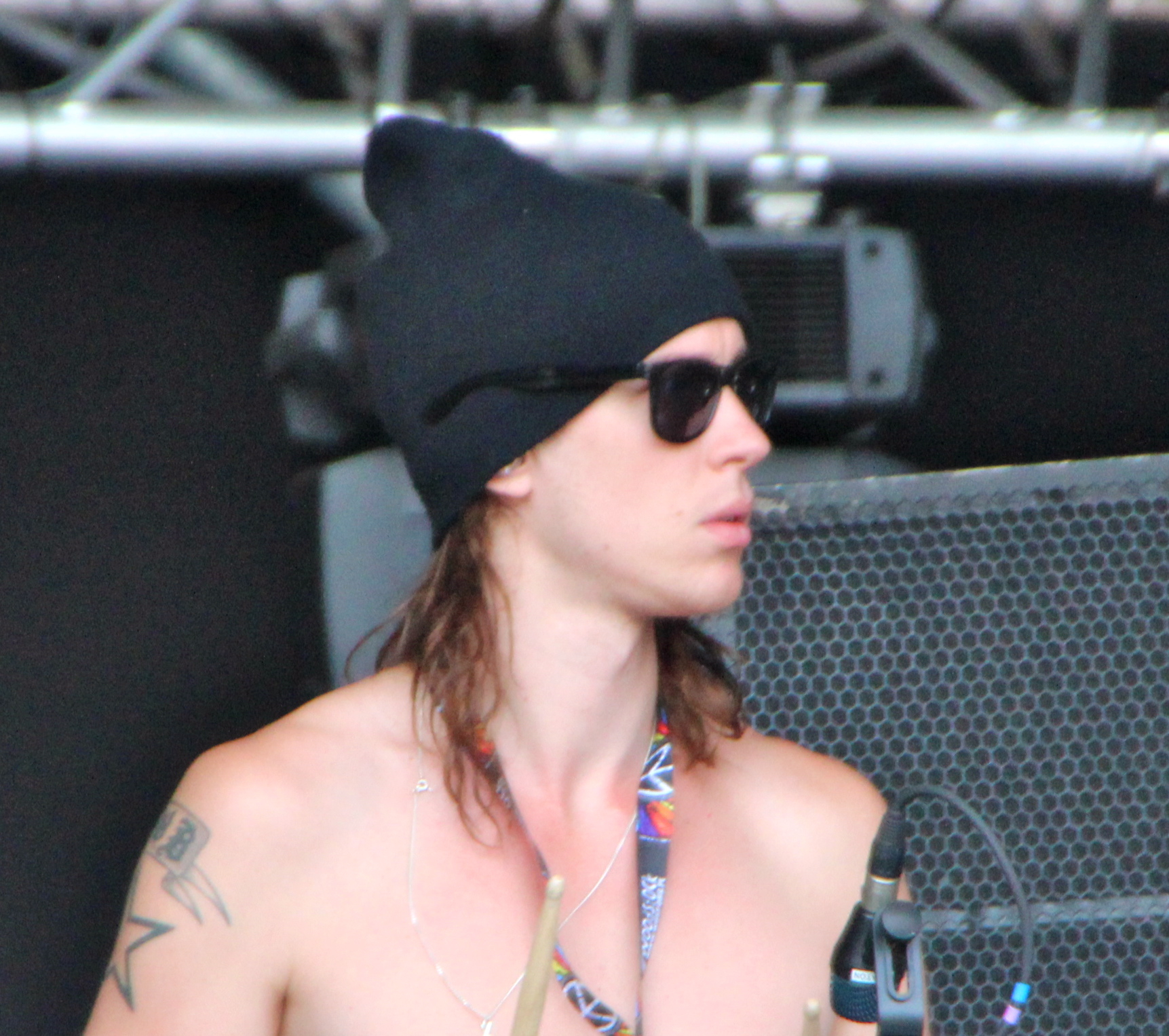 Robban Bäck (Sabaton) na Przystanku Woodstock w 2012 r.